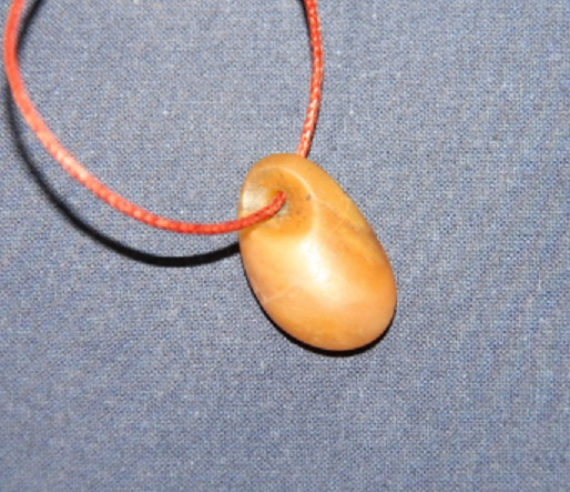 Perle gauloise en pierre